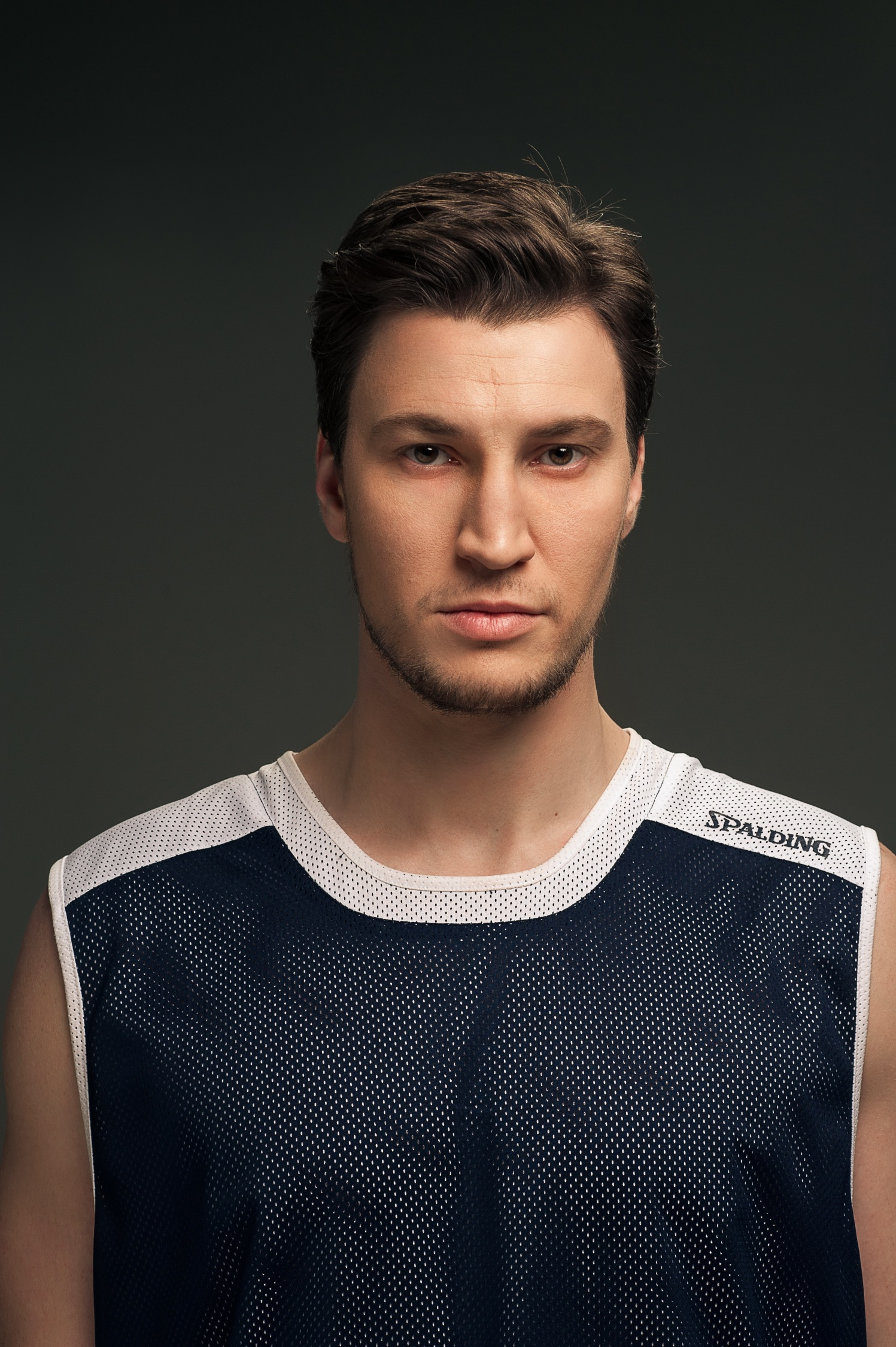 Alexander Dedushkin, russian professional basketball players